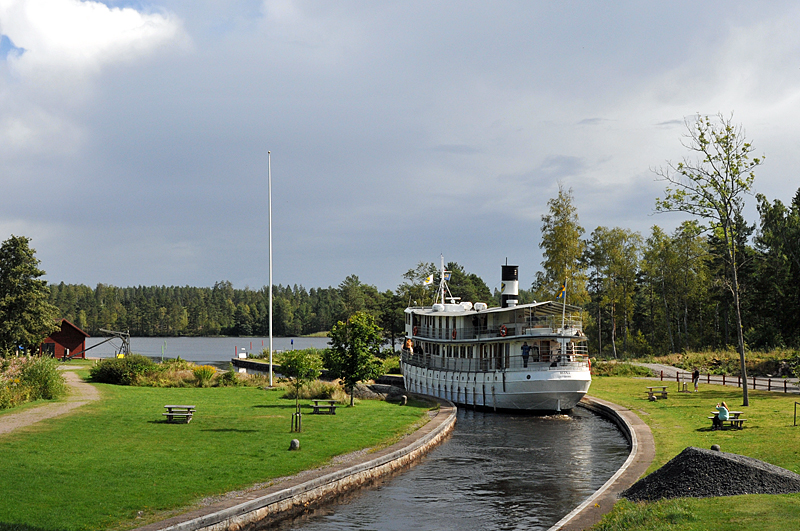 MS Diana vid Forsvik på Göta kanal i augusti 2012